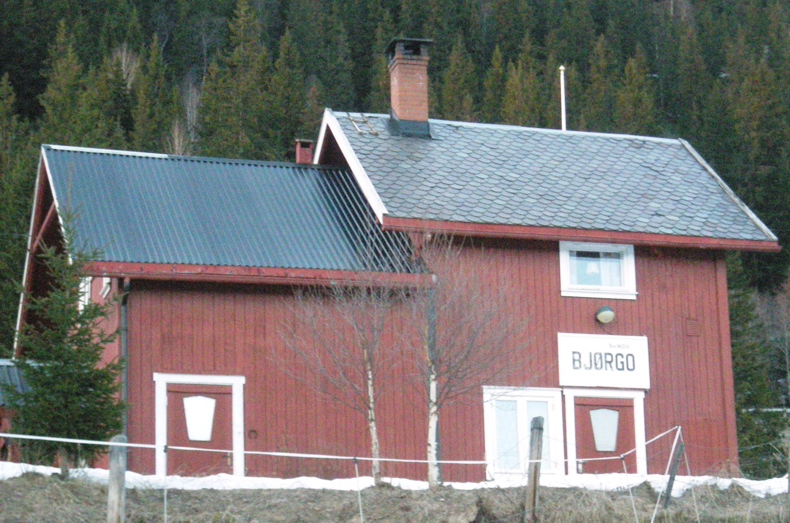 Bjørgo stasjon på Valdresbanen